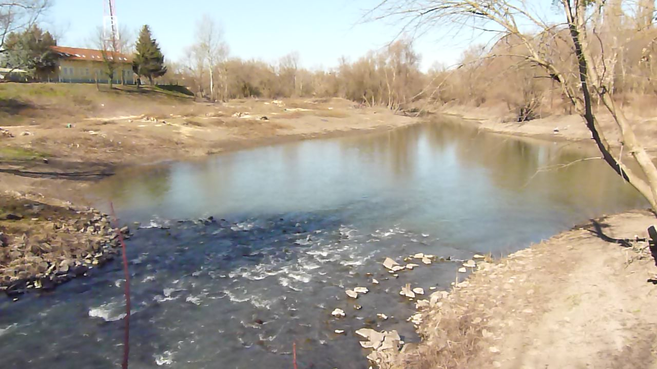 A felvételek 2013. Február 5 –én készültek Vásárosnaményben. Tamási Áron emléklap, Művelődési Ház, Balázs József emléklapja, Malenkíj robotra elhurcoltak emlékműve, Kraszna. Tomcsányi kastély. ©© Megjelent Creative Commons alatt a Metapolisz sorozatban. A Metapolisz sorozat valamennyi képe és filmje Creative Commons alatti valamint kereskedelmi - for profit - célra is felhasználható. Ajánlott hivatkozás: Derzsi Elekes Andor: Metapolisz DVD line ©© Published under Creative Commons in the Metapolisz DVD line. All of the photos and vids in the Metapolisz DVD line are under Creative Commons and can be used even for commercial – for profit – purposes. Recommended Citation Derzsi Elekes Andor: Metapolisz DVD line